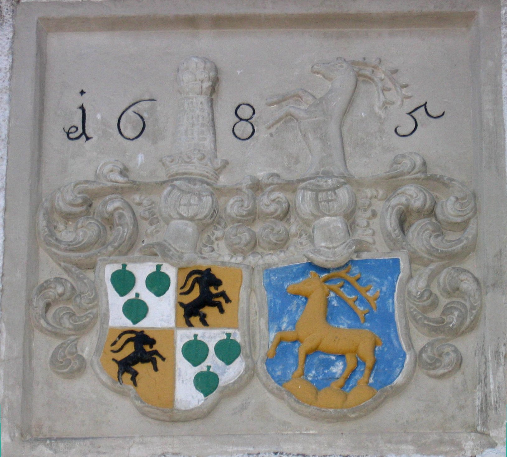 Allianzwppen an der Fassade von Schloss Espasingen in Espasingen, optisch links das Wappen der Herren von Bodman, optisch rechts Schindelin von Unterraitenau)